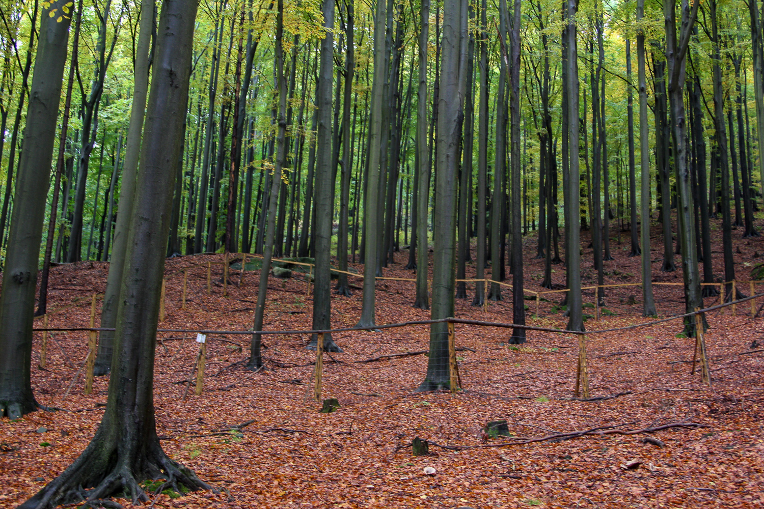 Biomonitorovací plocha NP České ŠVýcarsko v NPR Růžák.